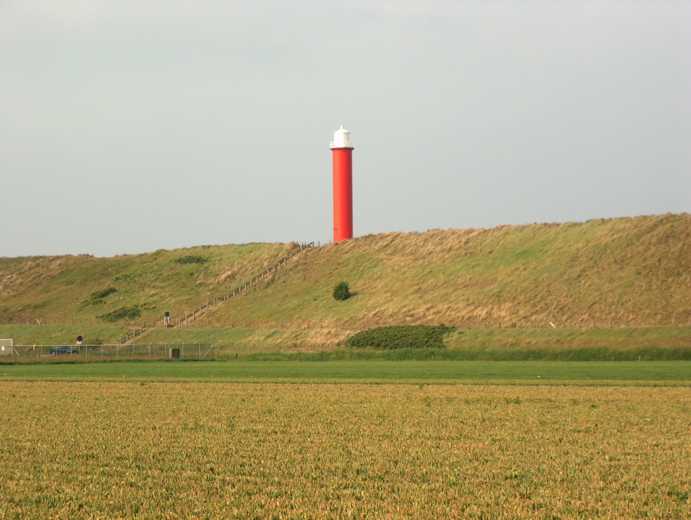 Vuurtoren Julianadorp